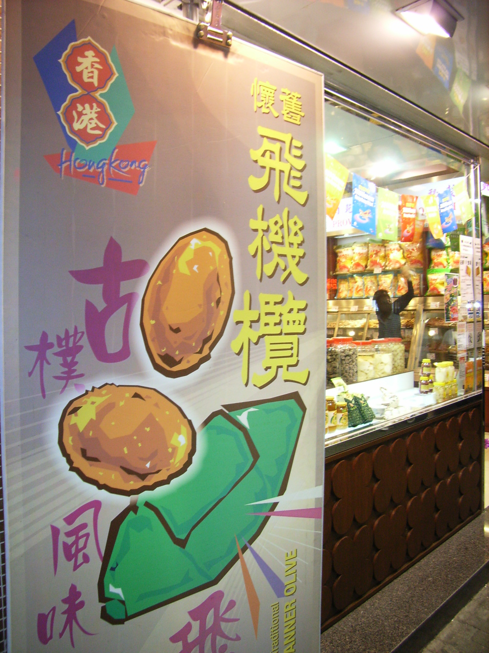 飛機欖原稱甘草欖，用鹽及甘草等藥材醃製造而成，甘草味濃，酸中帶甜，不易變壞，在50年代至70年代流行於香港及廣州等華南地區 by KennethTom